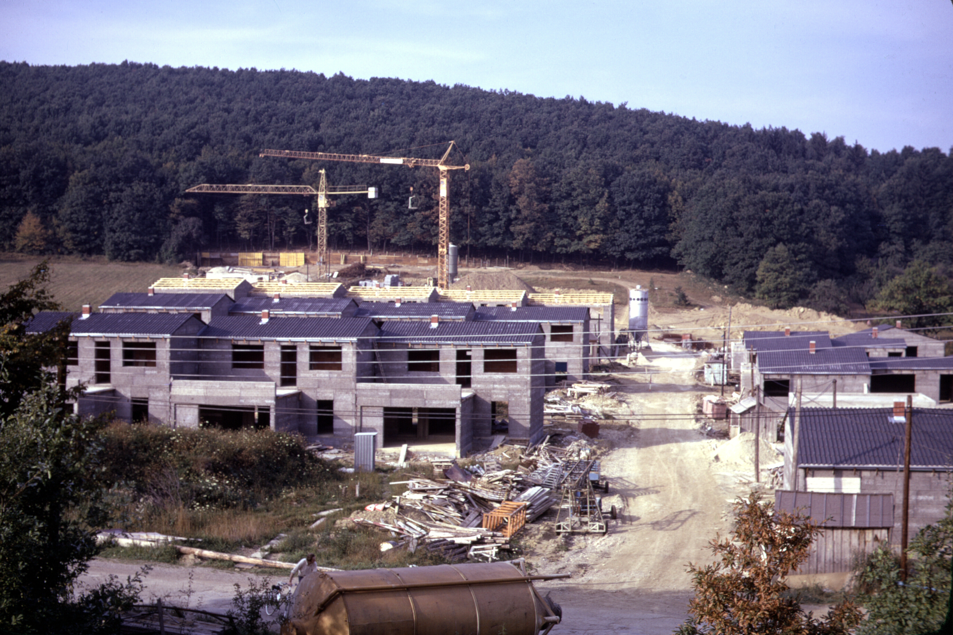 Die Reihenhaussiedlung in der Königsbühelstraße im Jahre 1976.